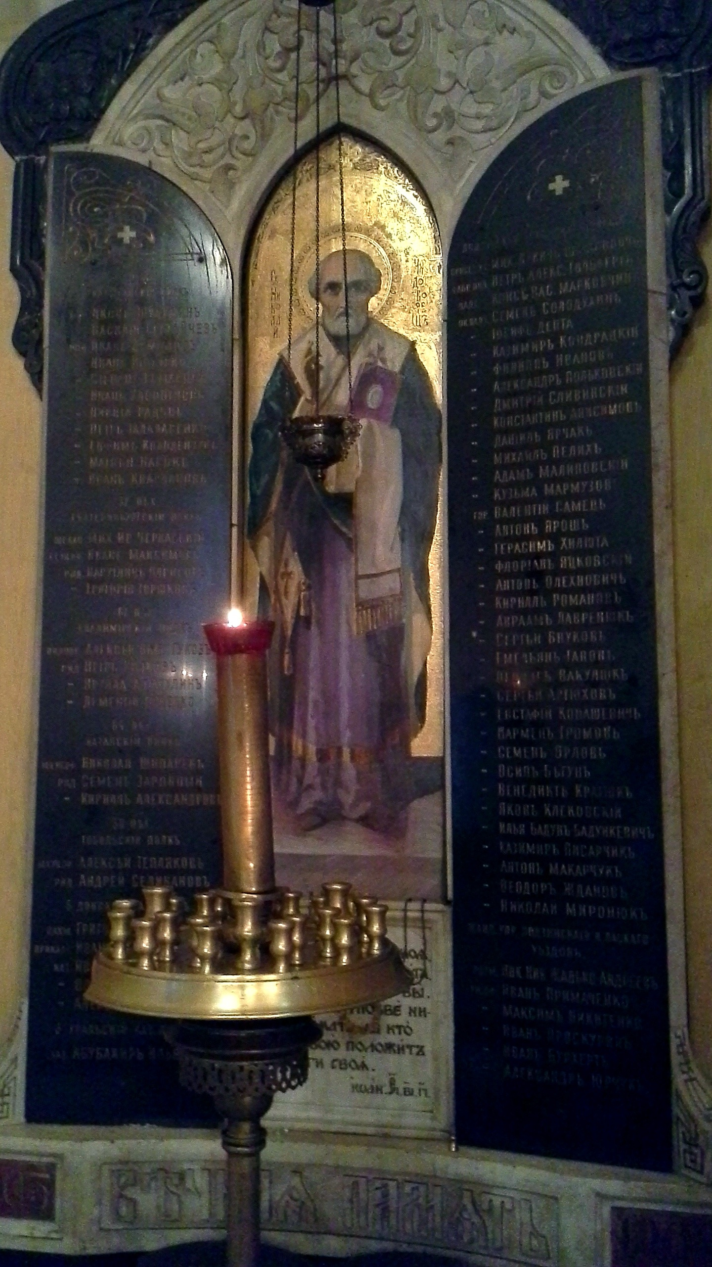 Sobór św. Aleksandra Newskiego w Łodzi. Tablica pamięci żołnierzy, żandarmów i policjantów rosyjskich poległych podczas tłumienia wystąpień rewolucyjnych r. 1905 oraz w latach następnych (do 1909). Na tablicach wymienione nazwiska zabitych żołnierzy z jednostek stacjonujących w Łodzi.